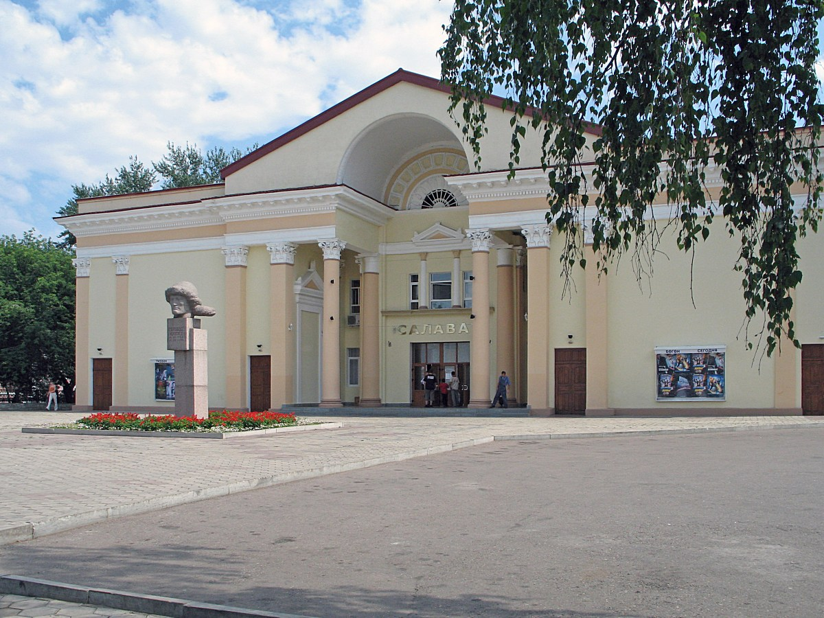 Кинотеатр «Салават» в г. Стерлитамак, Россия